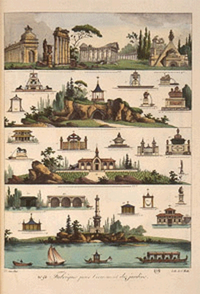 Gabriel Thouin. Plans raisonnés de toutes les espèces de jardins cote Les 1754, pl.53 : fabriques pour l’ornement des jardins (collections de l’ENSBA)